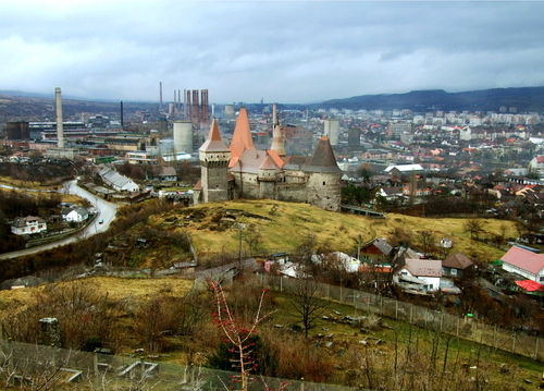 „Dealul Sânpetru”...